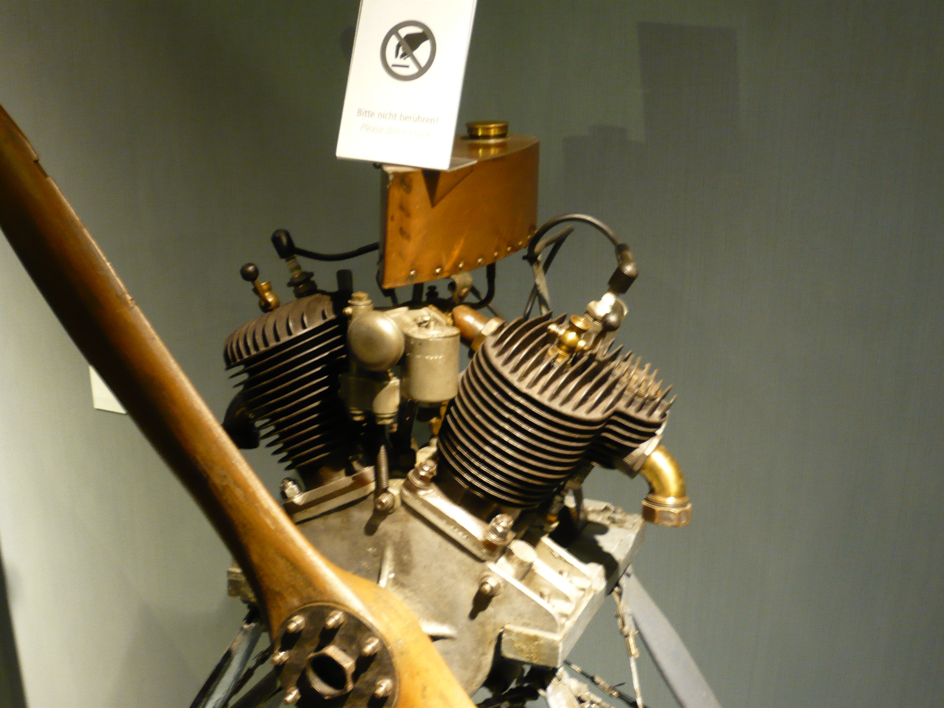 V-2 aircraft engine